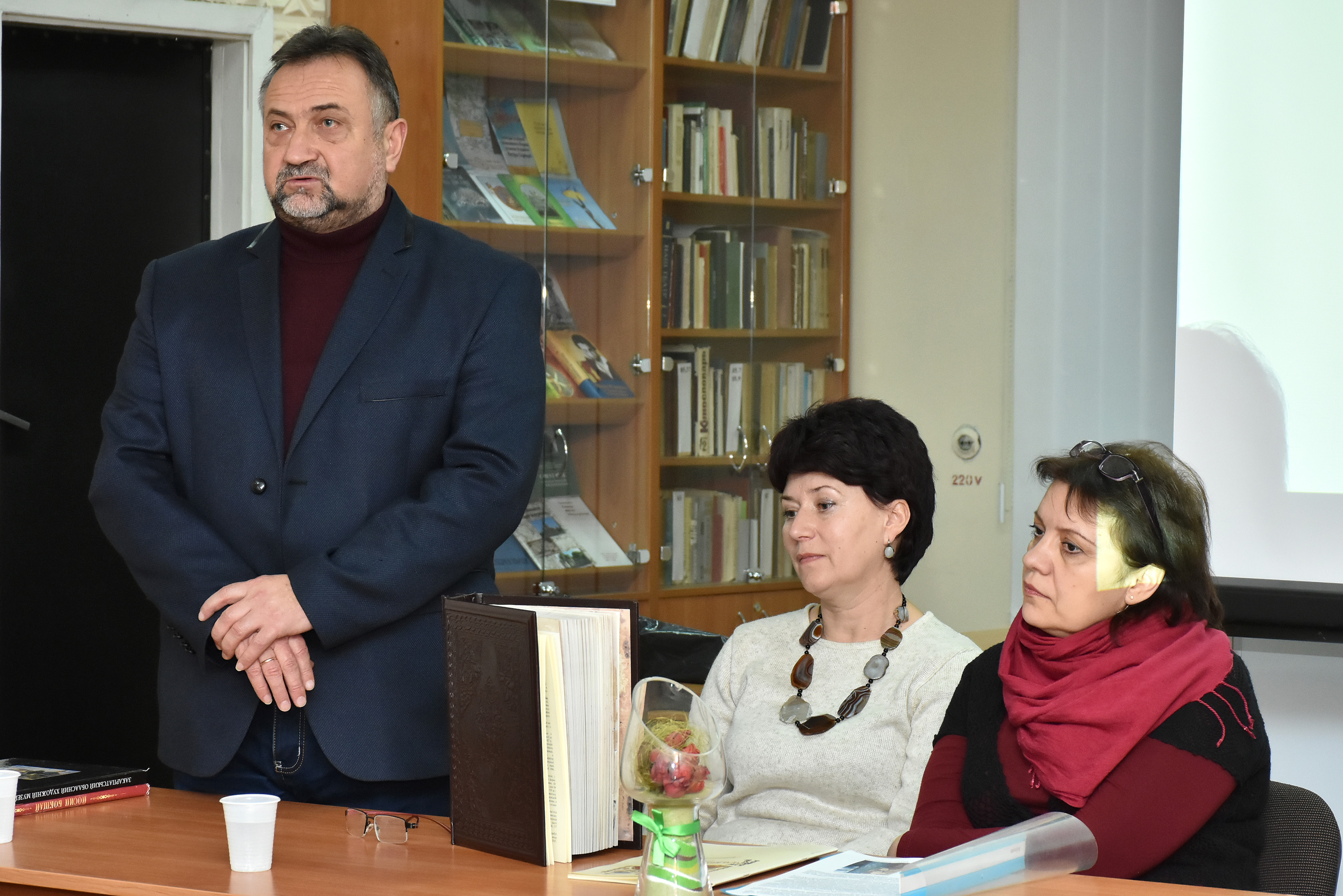 Презентація факсимільного видання Королевського Євангелія в Тернопільській обласній універсальній науковій бібліотеці. Зліва направо: заслужений працівник культури Юрій Глеба, кандидатка мистецтвознавства Одарка Сопко, дизайнерка Ірина Дяк.